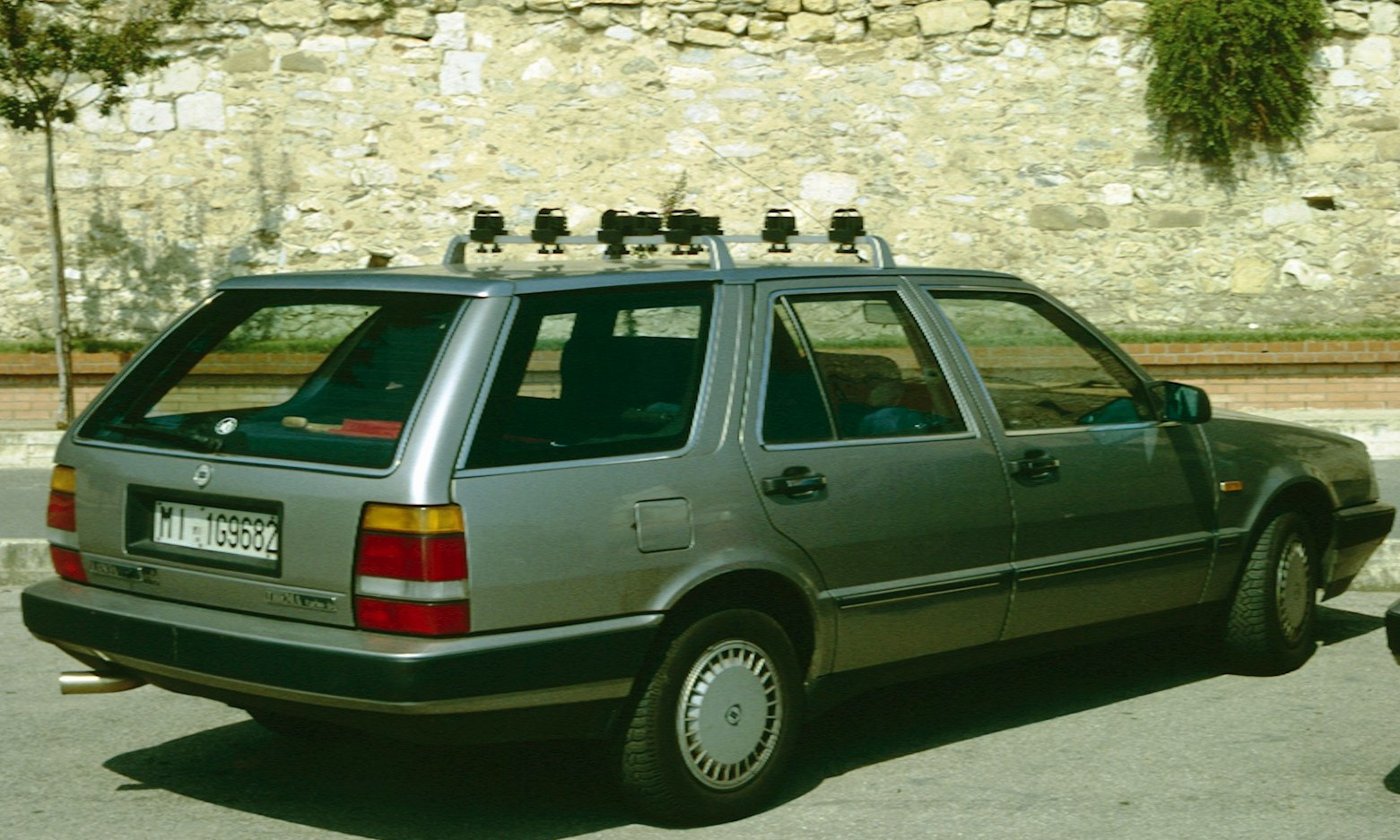 Lancia Thema Estate at Castiglione del Lago (PG)